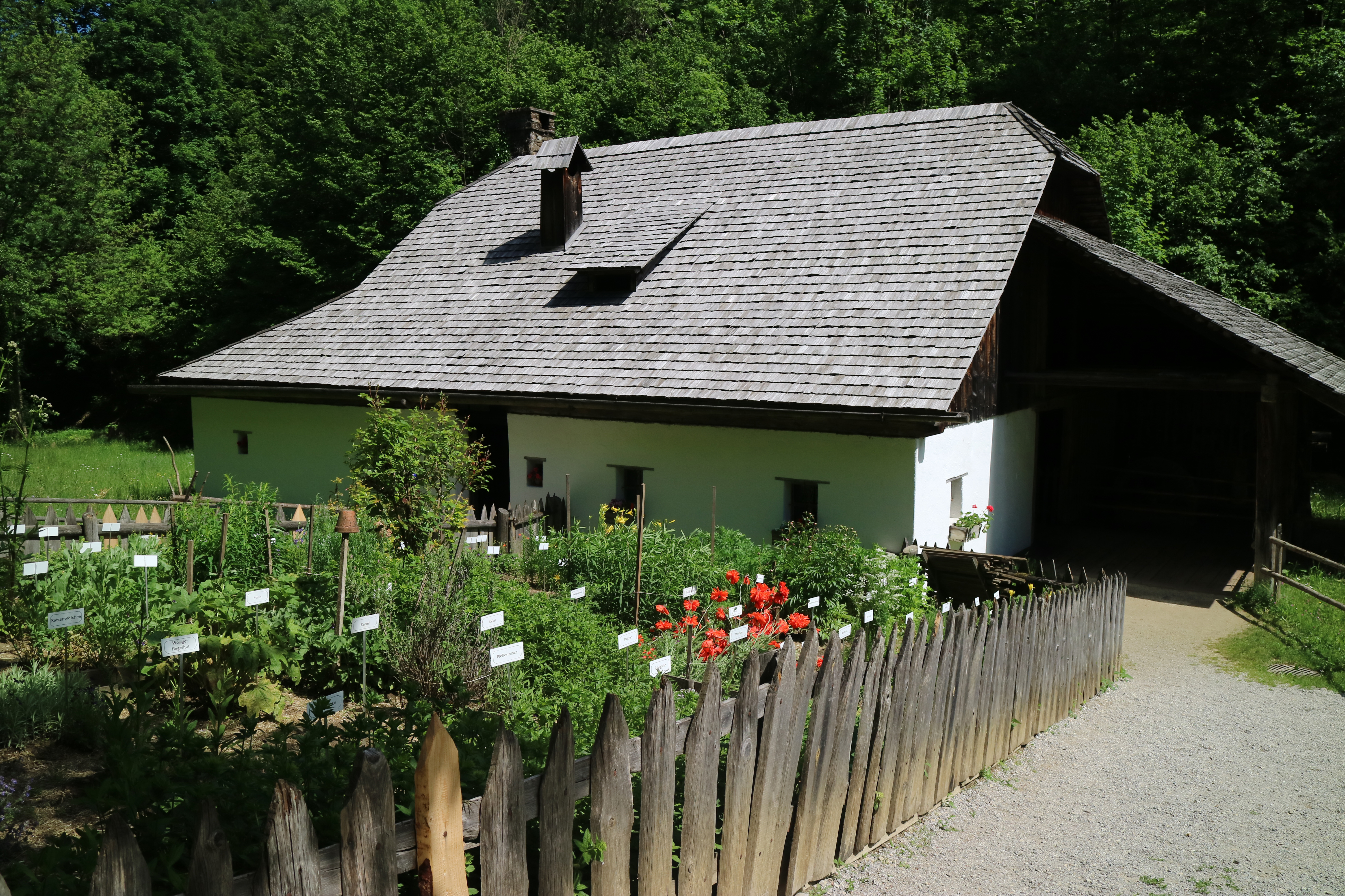 Kräutergarten und Schmiede im Freilichtmuseum Stübing bei Graz